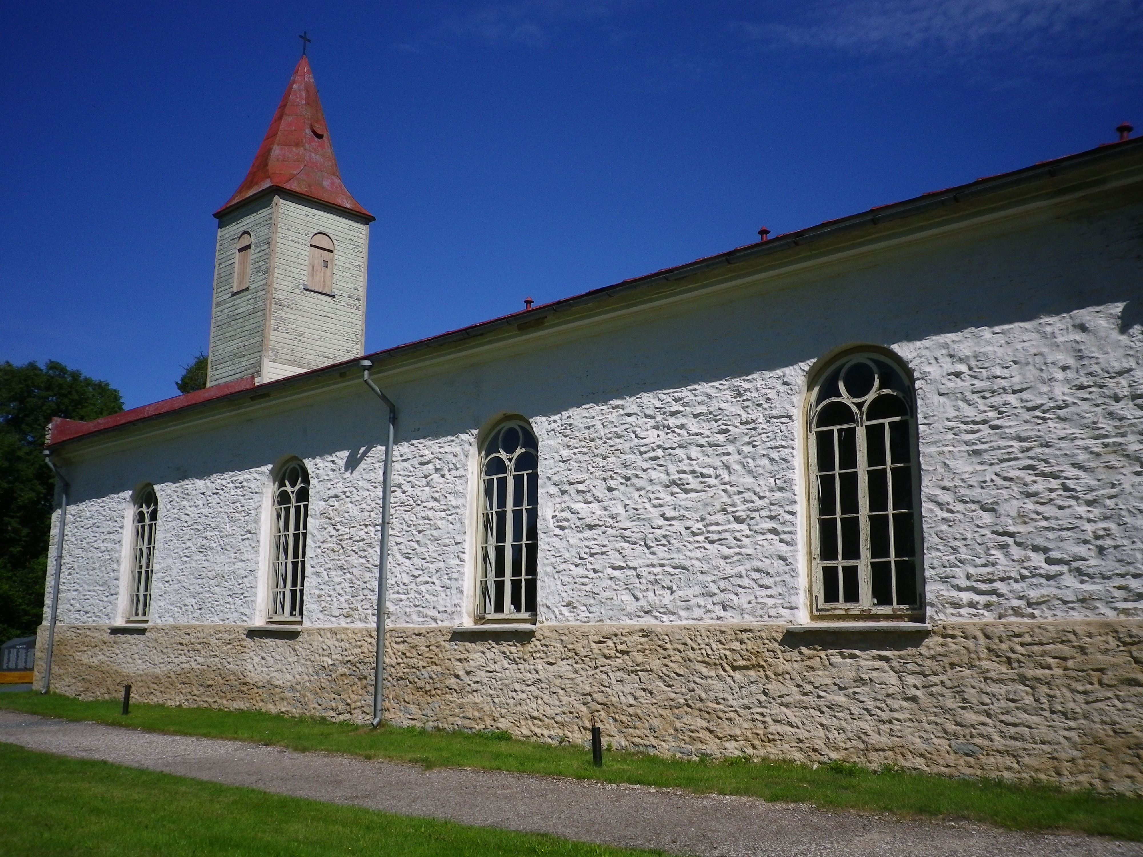 Kärdla kirikEesti: Kärdla church, Hiiumaa, Estonia